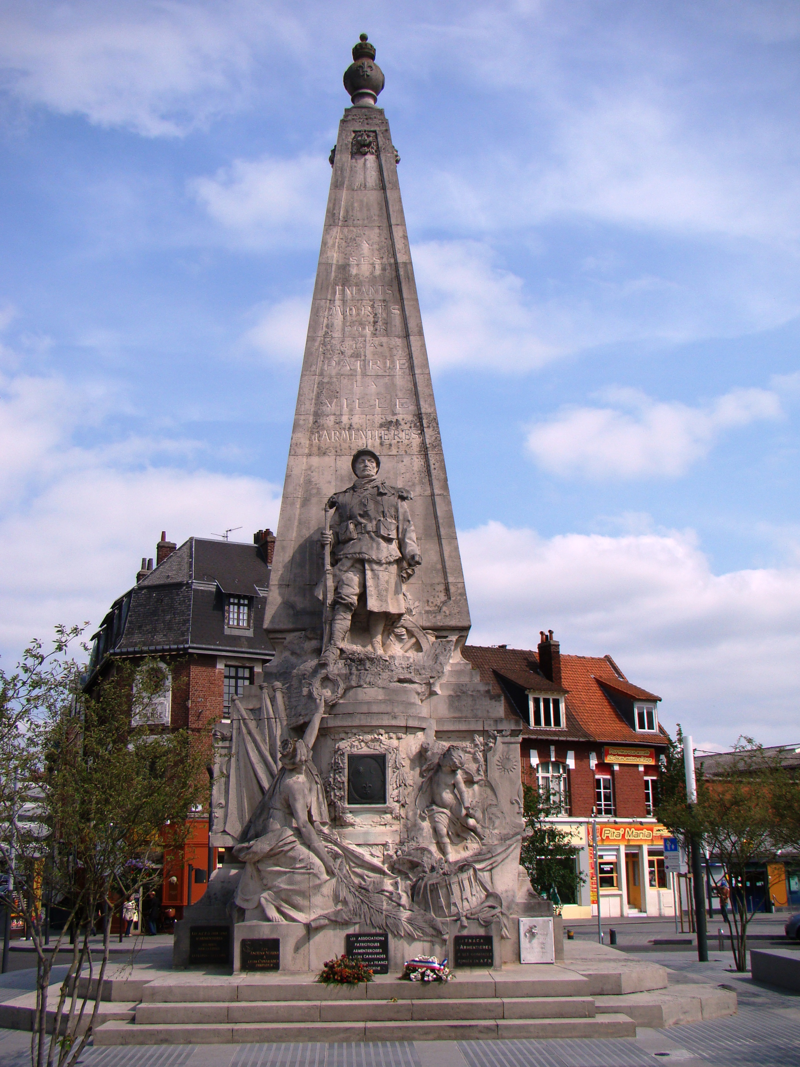 Armentières, monument aux Morts, par Louis Marie Cordonnier, architecte et Edgar Boutry, sculpteur